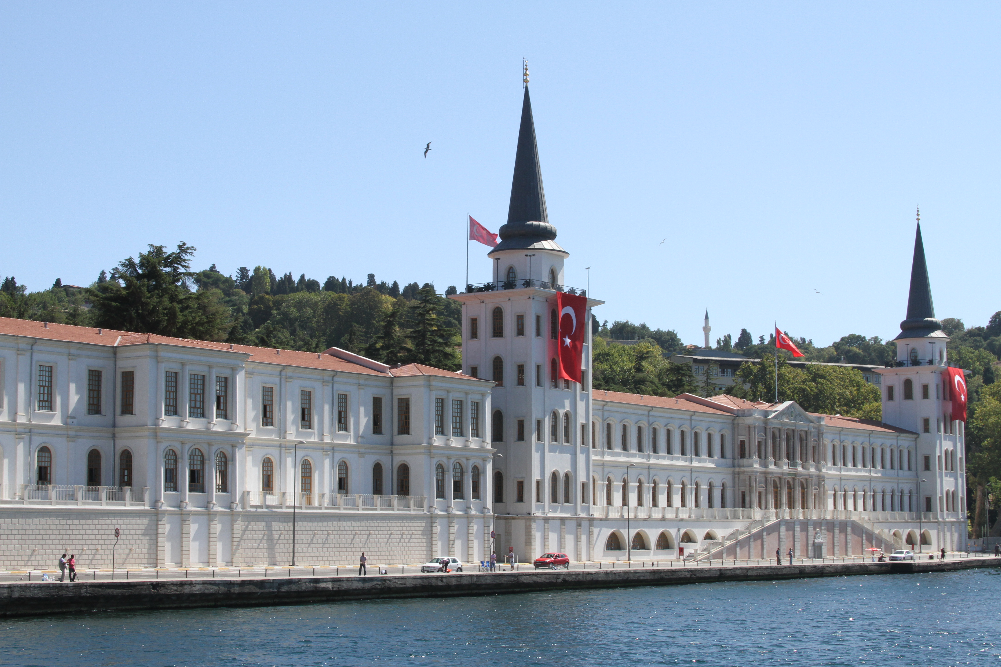 Vista do Kuleli Askeri Lisesi (Escola Militar) a partir do Bósforo